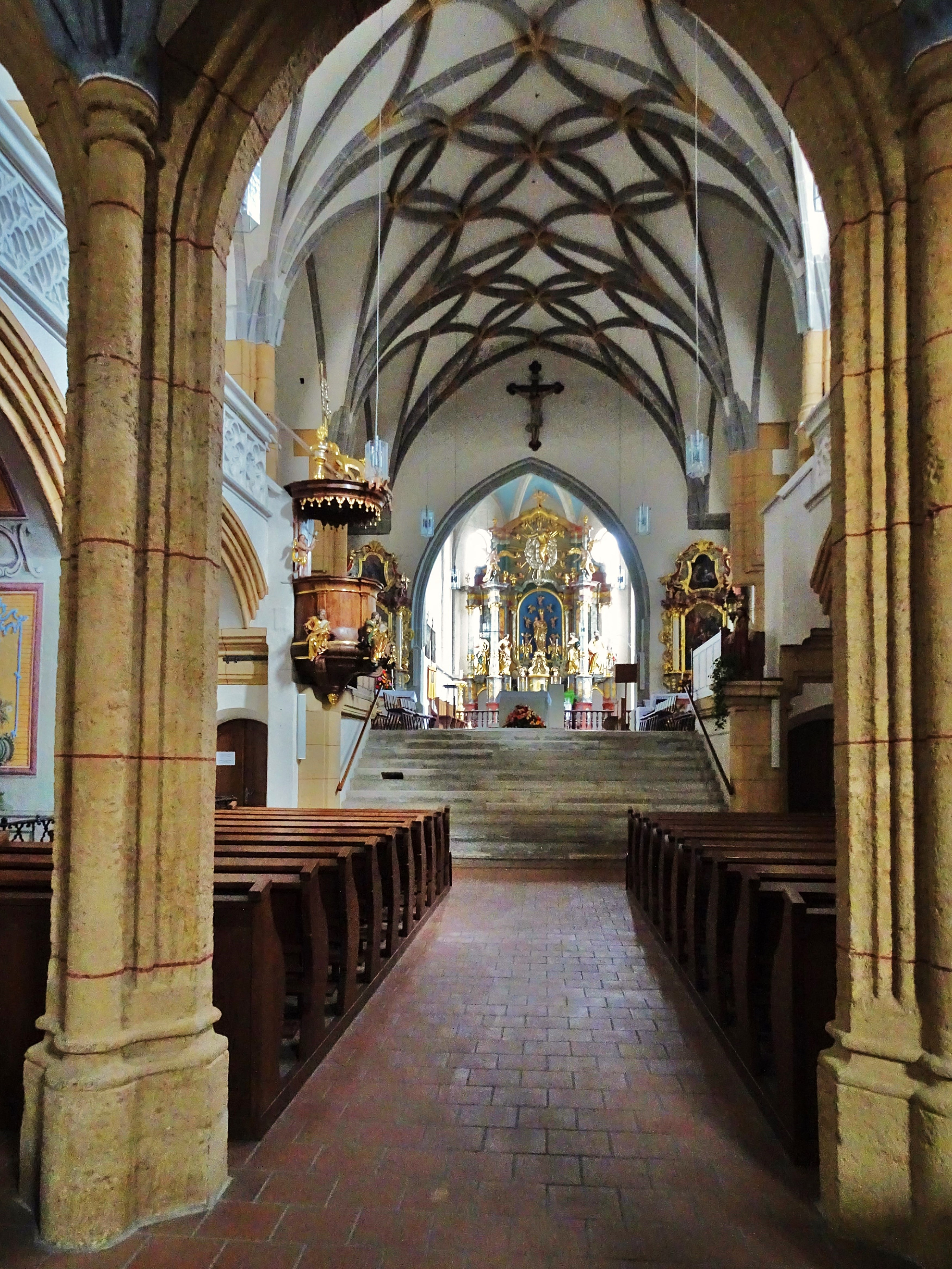 Innenansicht der ehemaligen Stiftskirche (Eberndorf)